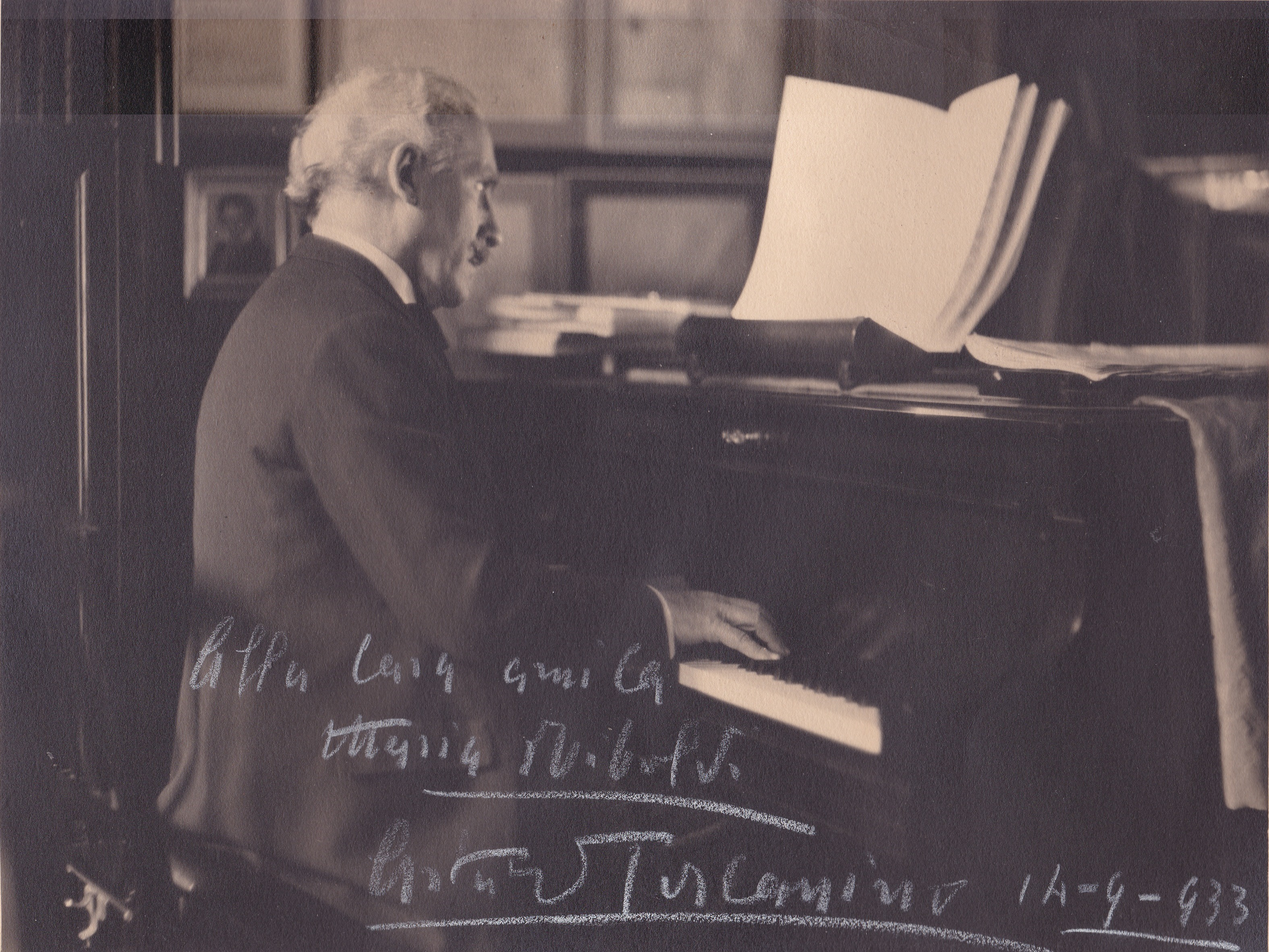 Dedica originale di Arturo Toscanini a Maria Farneti